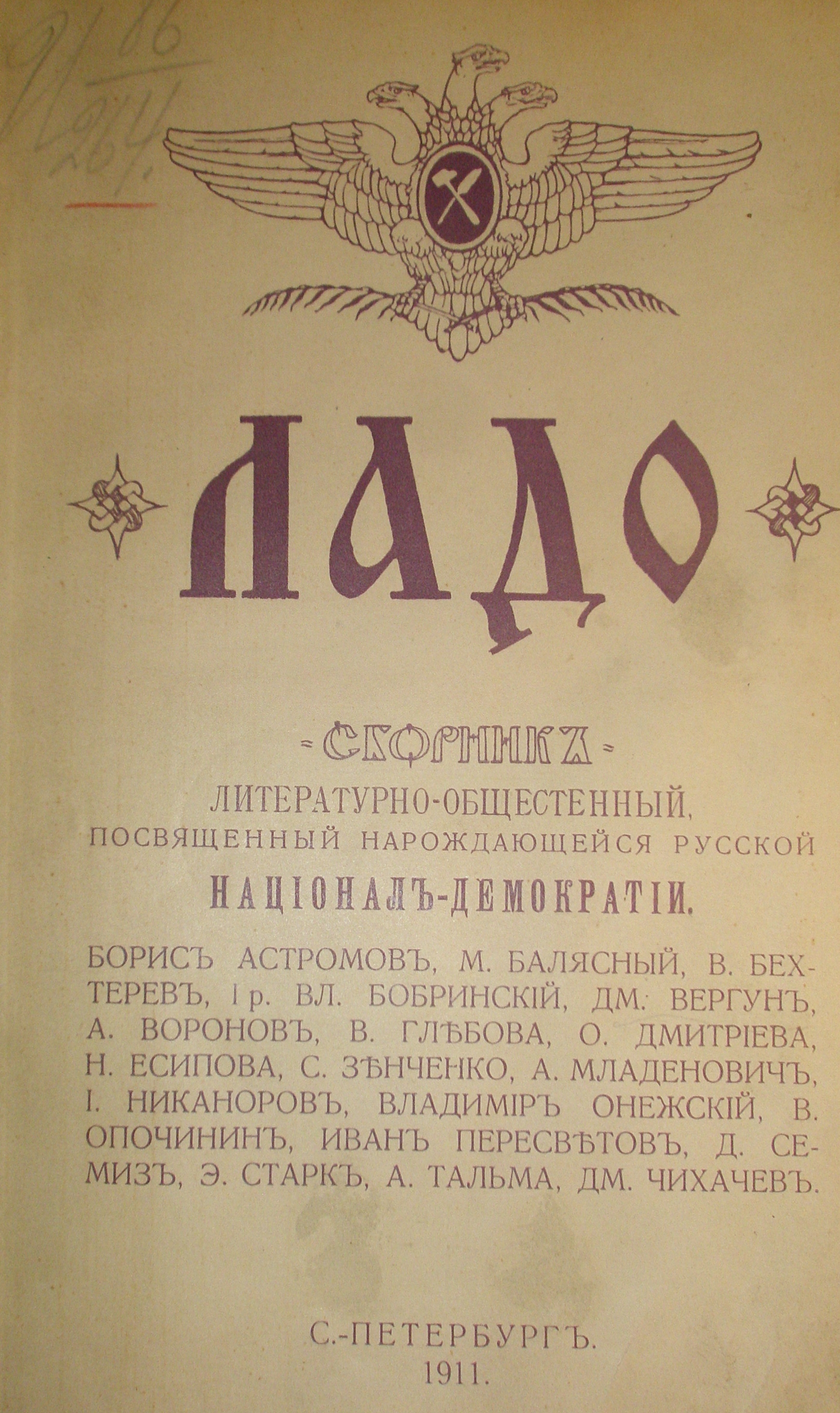 Обложка литературно-общественного сборника "Ладо"